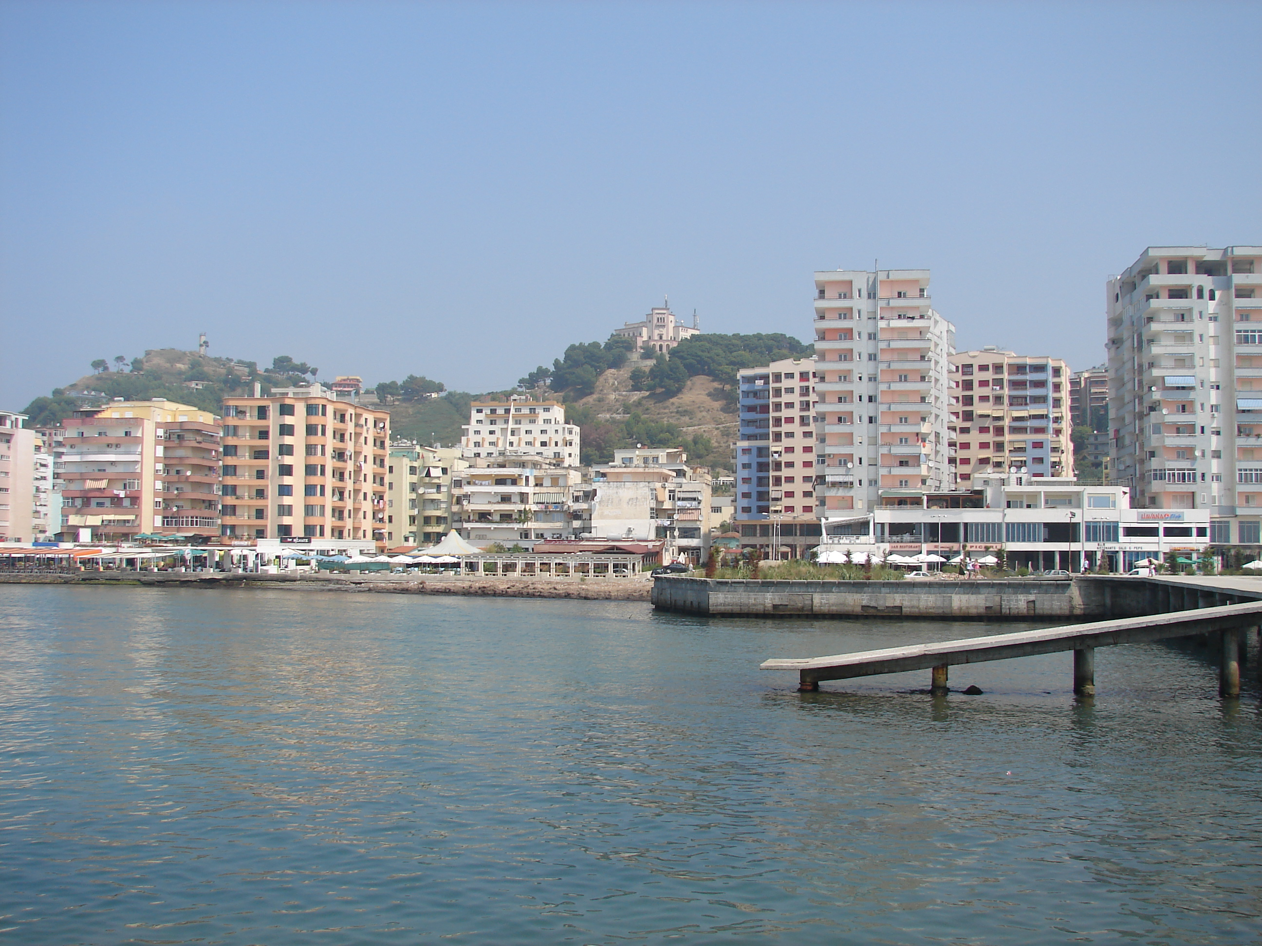 Durrës, Albania